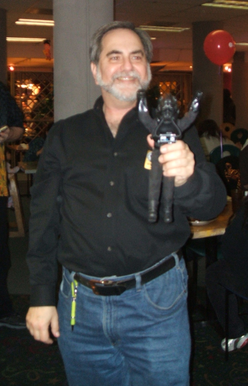 Steve Sansweet